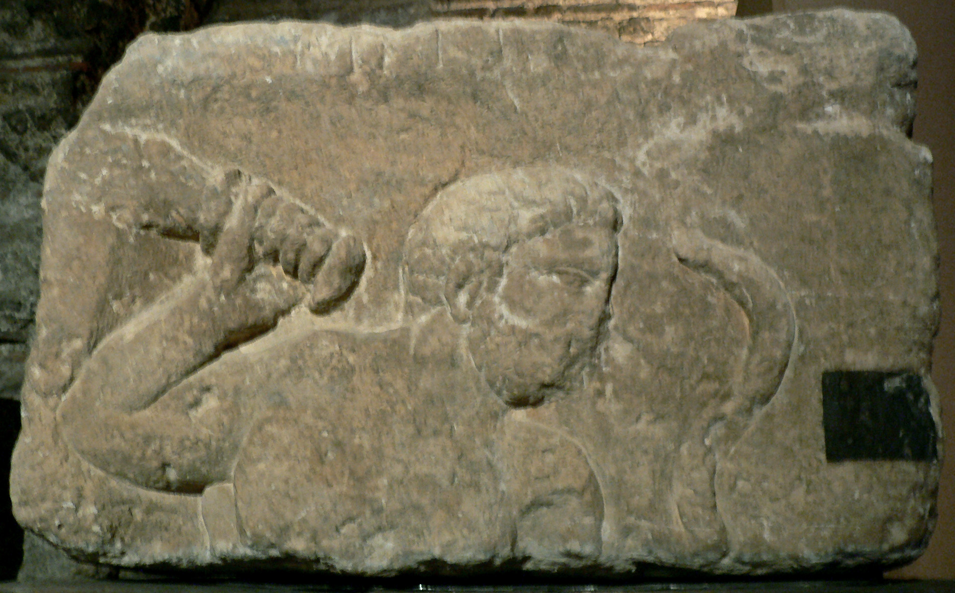 Le pilier des Nautes Smertrios Musée National du Moyen Age, Thermes de Cluny Source : Clio20